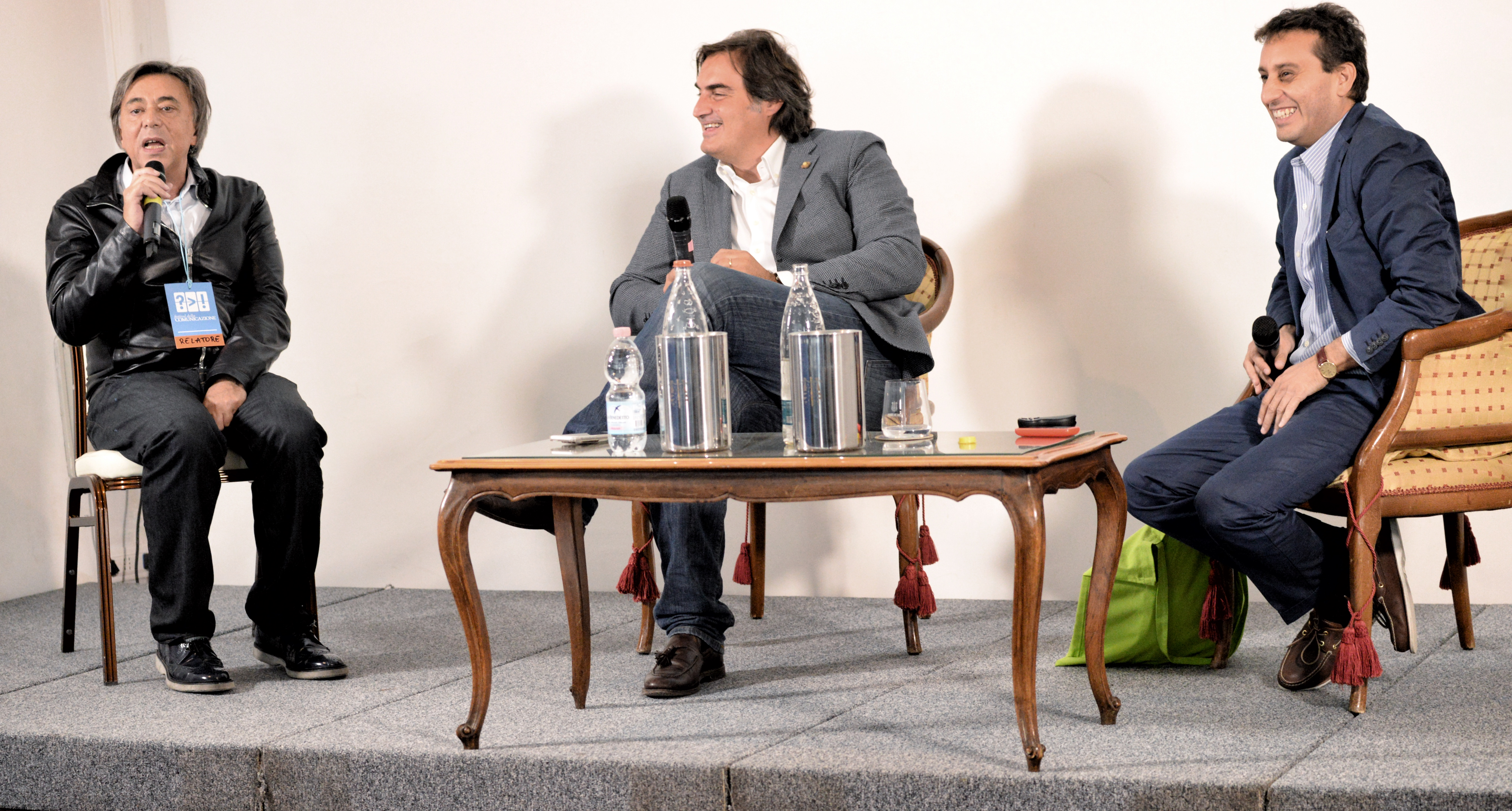 Carlo Freccero, Pierluigi Pardo e David Parenzo al FestivalCom